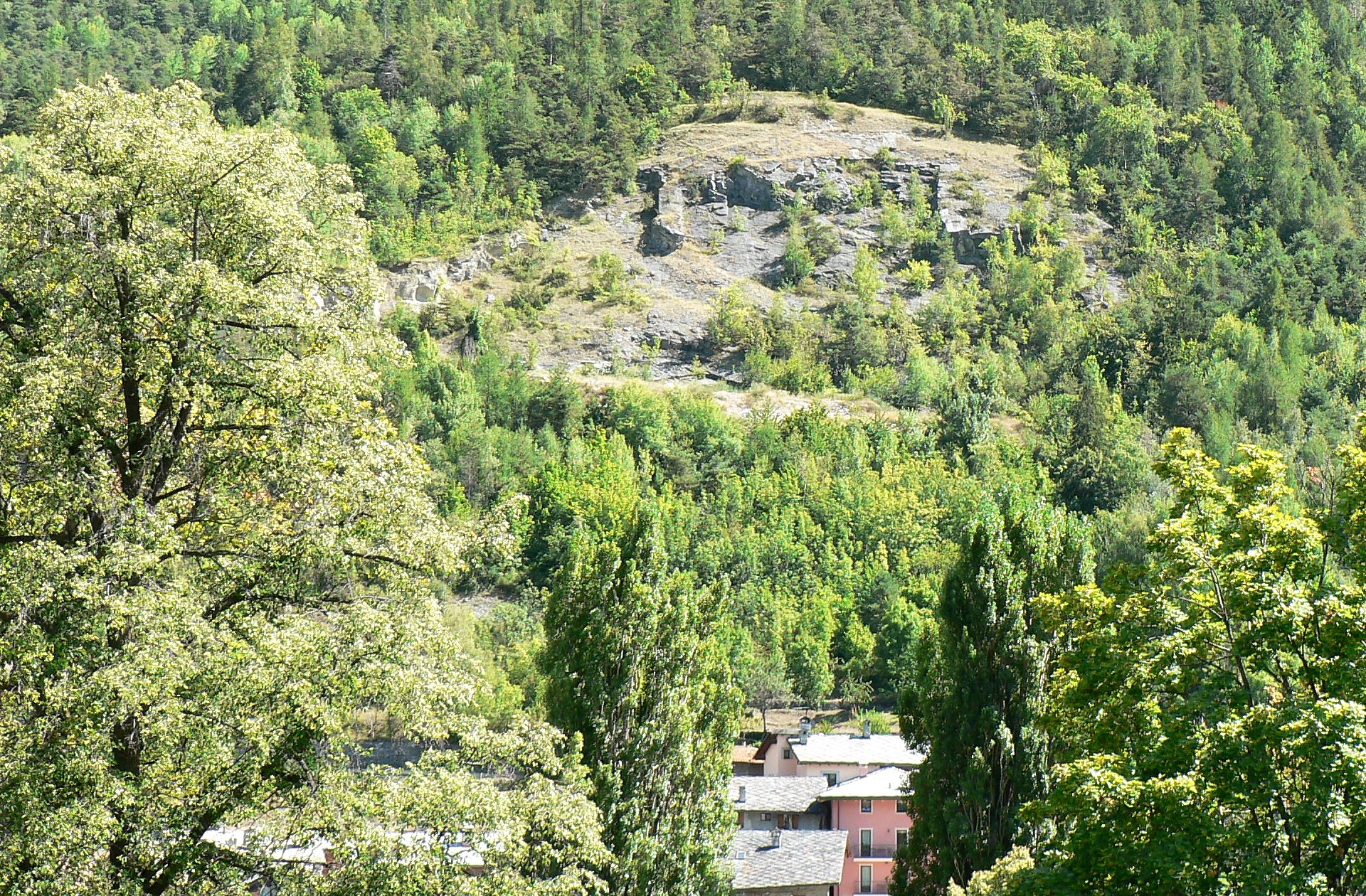 antica cava di marmo Bardiglio ad Aymavilles, Valle d'Aosta, Italia.